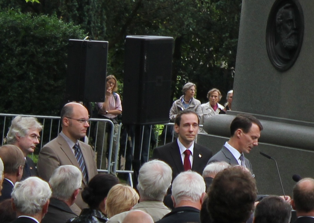 Flensburger Löwe - Wiedereinweihung - Michael Zenner, Simon Faber, Christian Dewanger und Prinz Joachim von Dänemark